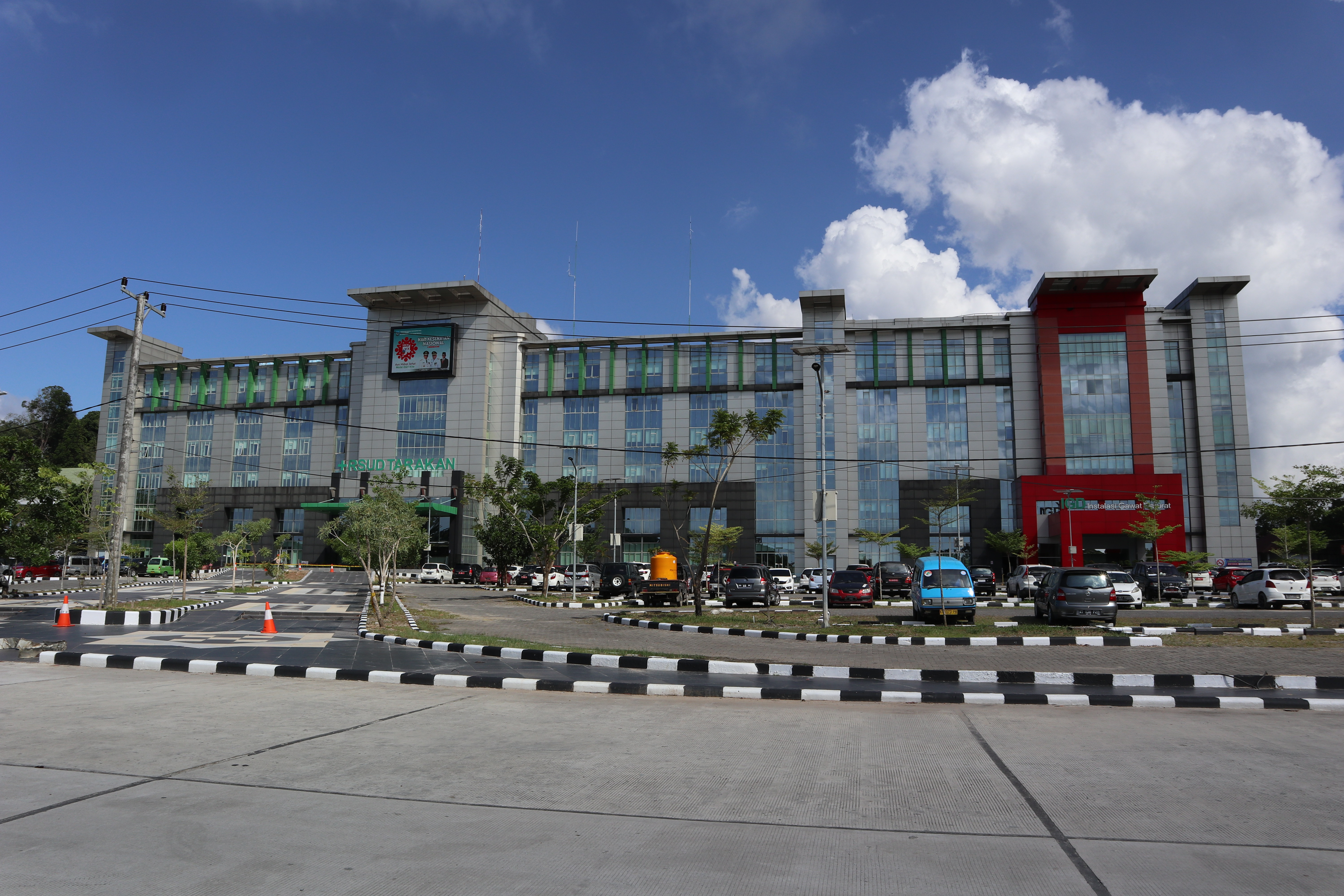 RSUD Tarakan, rumah sakit milik pemerintah provinsi Kalimantan Utara.